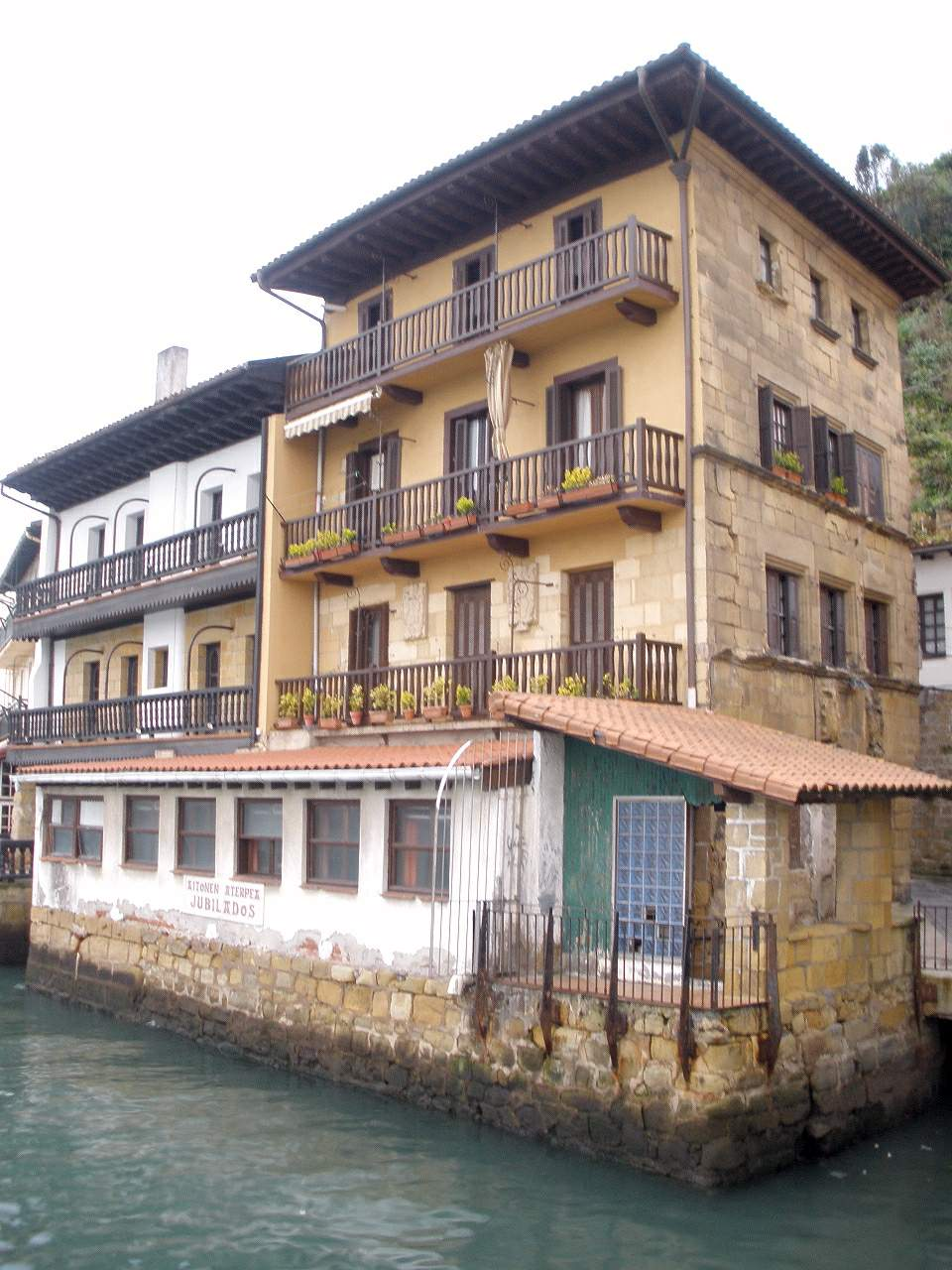 Pasajes de San Juan - Casa de Miranda (Mirandatarren etxea) 2